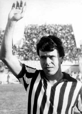 Hamadi Agrebi lors de EST-CSS à El Menzah